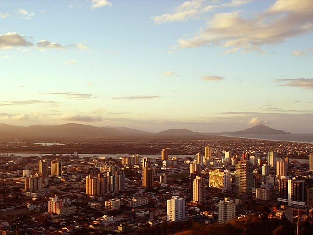 Itajaí,SC - Brazil